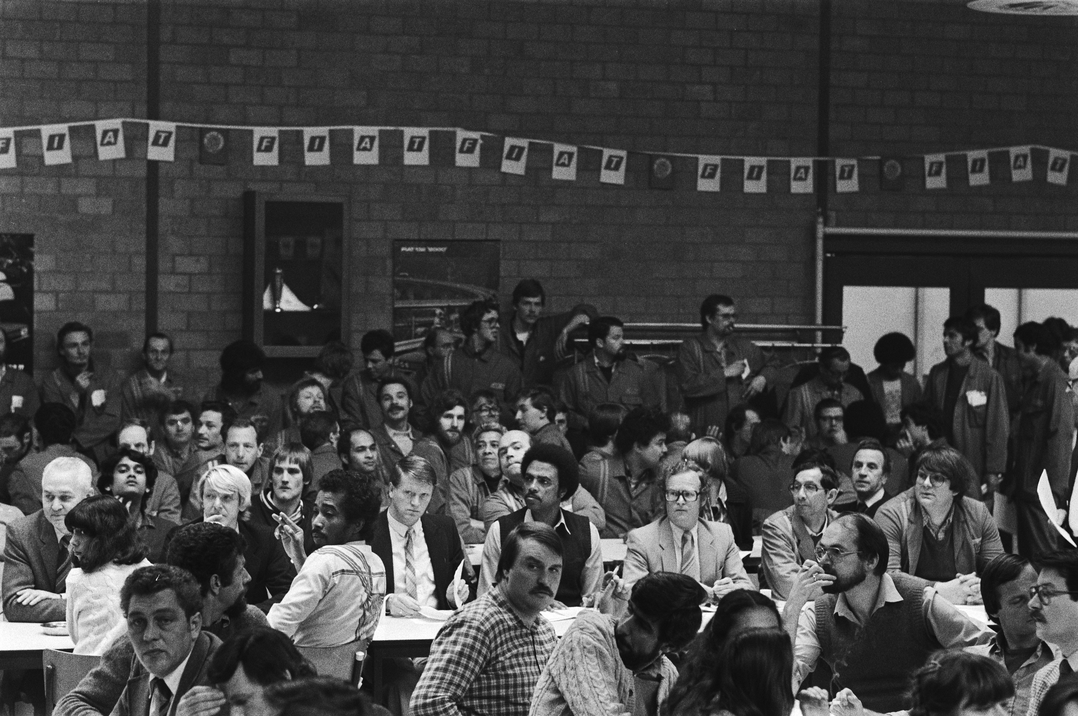 Collectie / Archief : Fotocollectie Anefo Reportage / Serie : [ onbekend ] Beschrijving : Protestverg. door personeel van Leonard Lang i.v.m. dreigende overname van bedrijf door Fiat Turijn, Datum : 4 mei 1981 Locatie : Amsterdam, Noord-Holland Trefwoorden : PERSONEEL, Protestvergaderingen, kantines Persoonsnaam : Fiat, Lang, Leonard Fotograaf : Bogaerts, Rob / Anefo Auteursrechthebbende : Nationaal Archief Materiaalsoort : Negatief (zwart/wit) Nummer archiefinventaris : bekijk toegang 2.24.01.05 Bestanddeelnummer : 931-4671